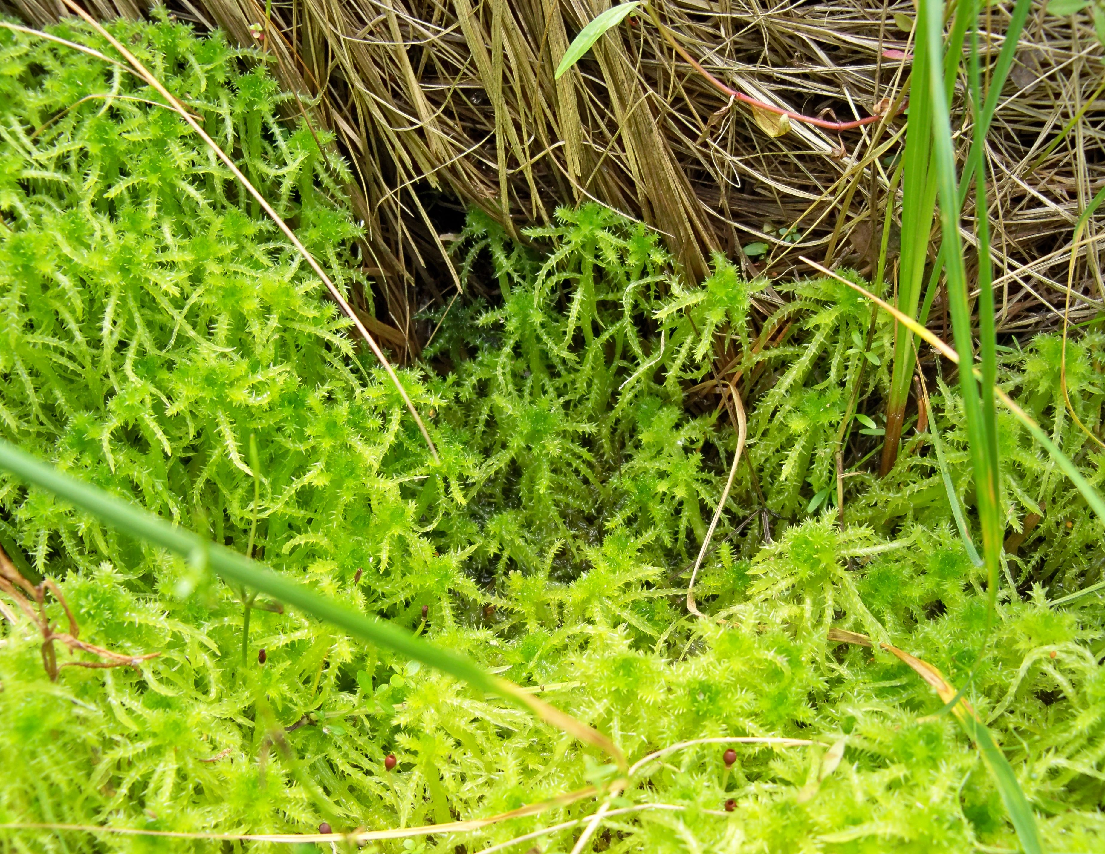 Torfowce w użytku ekologicznym Kotel we Wdzydzkim Parku Krajobrazowym